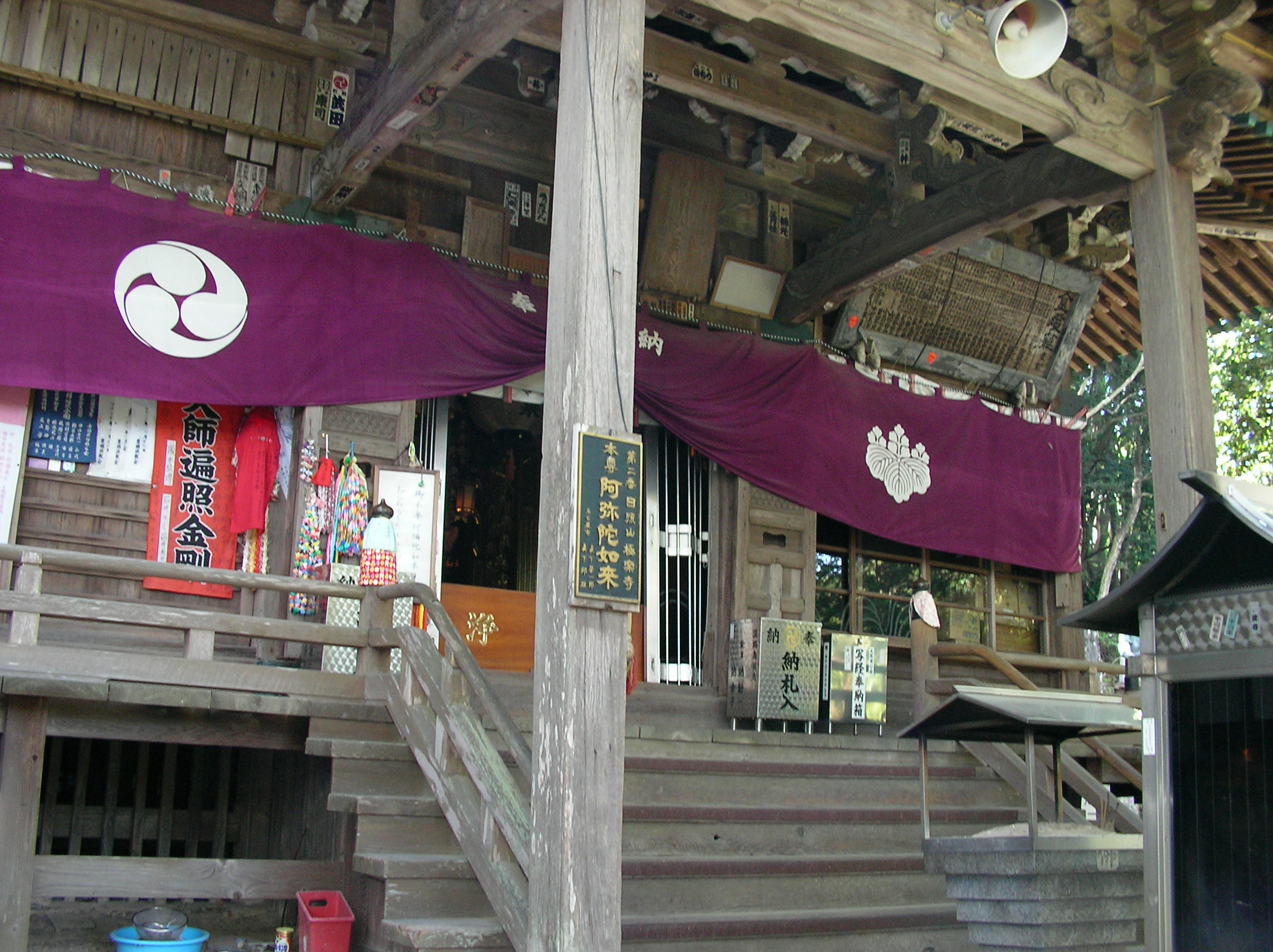 nishozan-gokurakuji-main